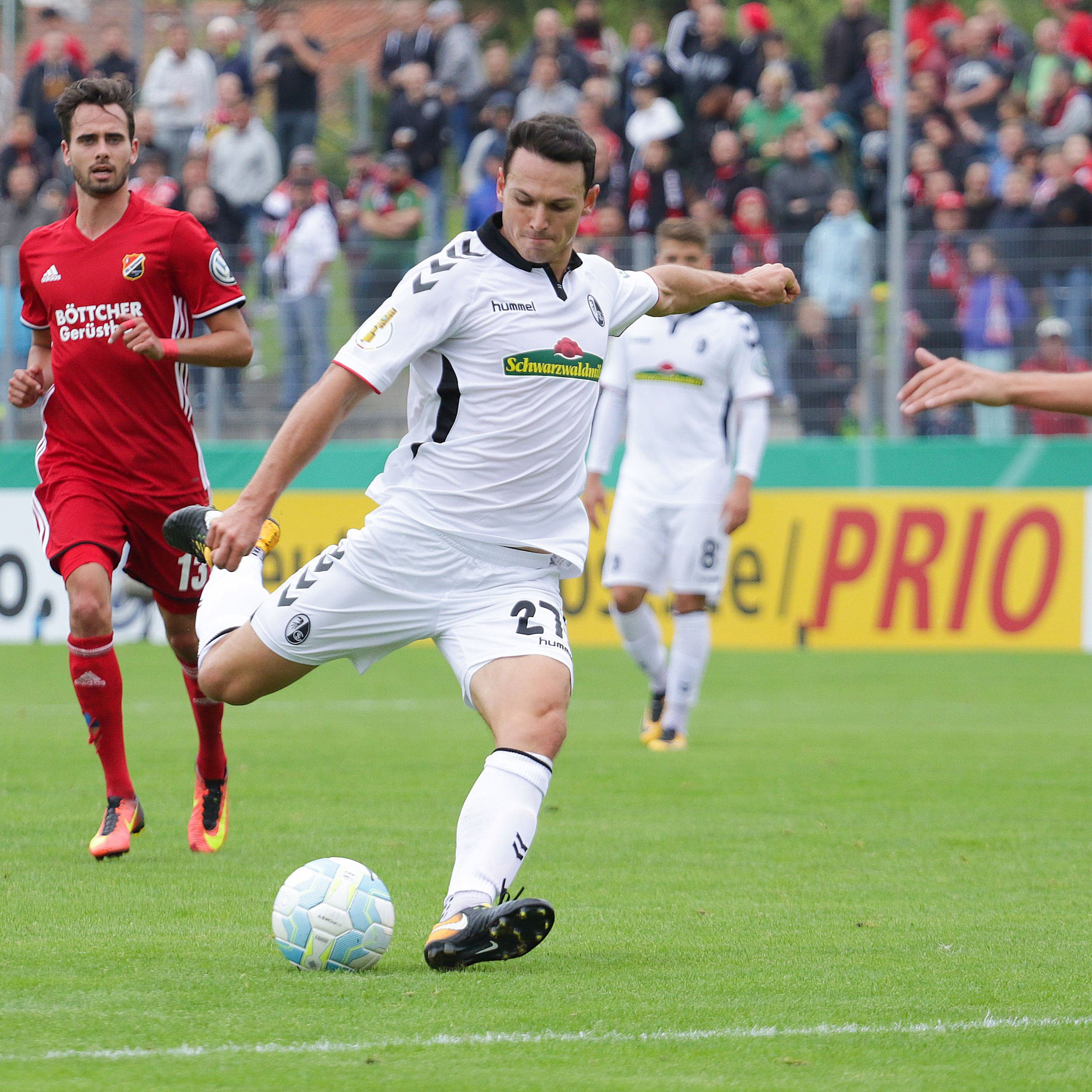 Nicolas Höfler beim DFB-Pokalspiel VfB Germania Halberstadt vs. SC Freiburg